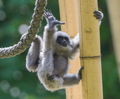 Der kleine Silbergibbon Mia bei ersten Kletterversuchen